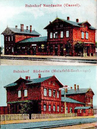 Bahnhof Waldkappel. Scans einer Ansichtskarte von 1911 oder früher.